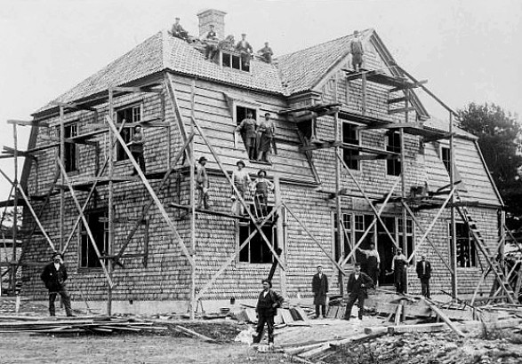 Nynäshamn, stationshus, arkitekt Ferdinand Boberg